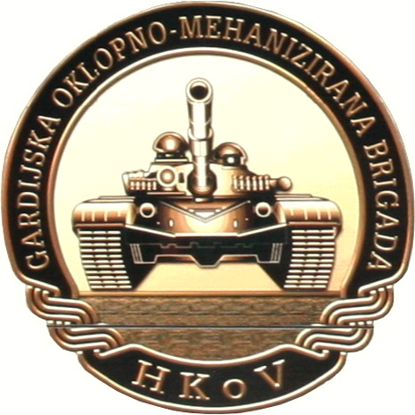 Logo Gardijske oklopno-mehanizirane brigade HKoV-a